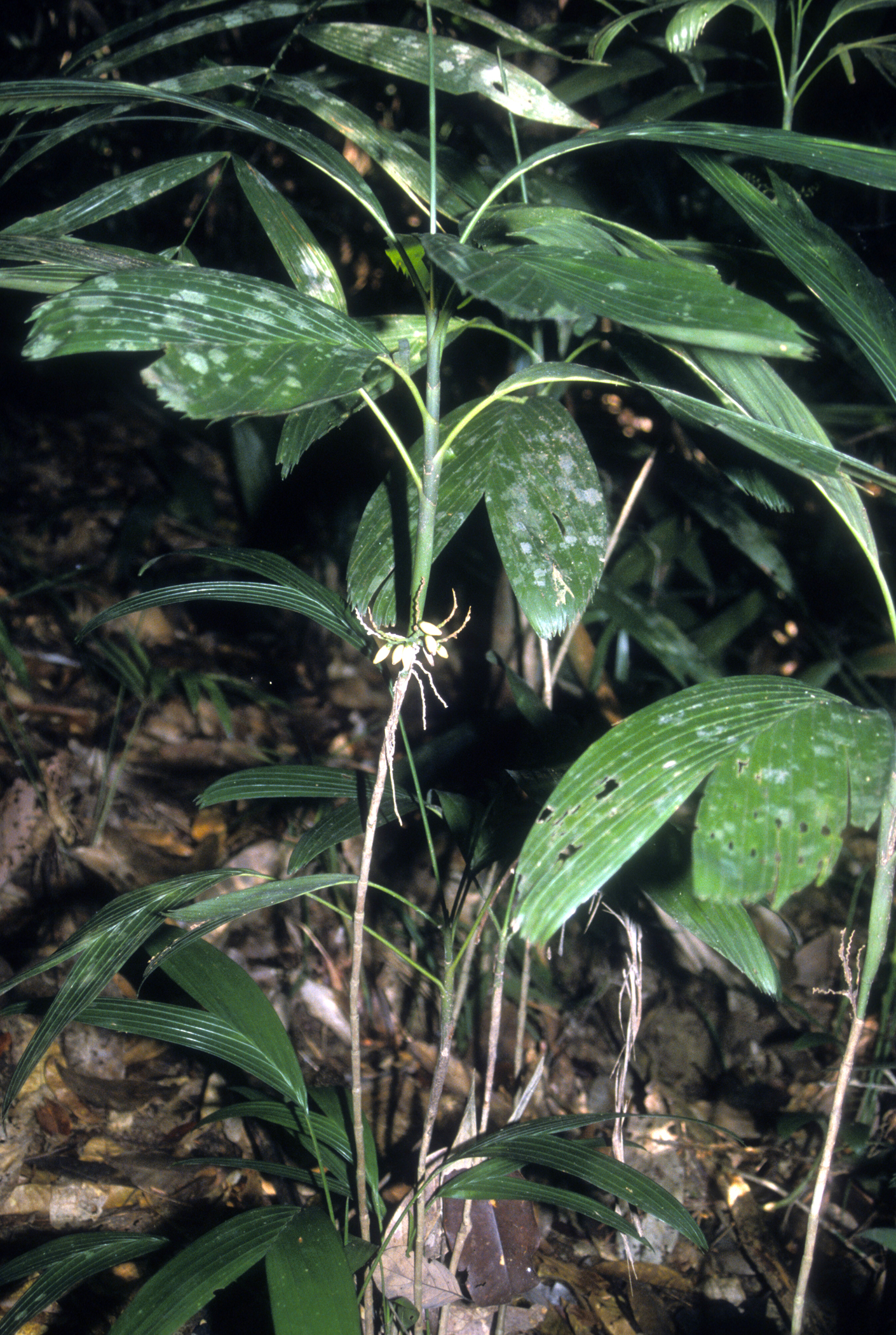 Areca ridleyana, Jengai, Terengganu, Malaysia. Oct 2002.